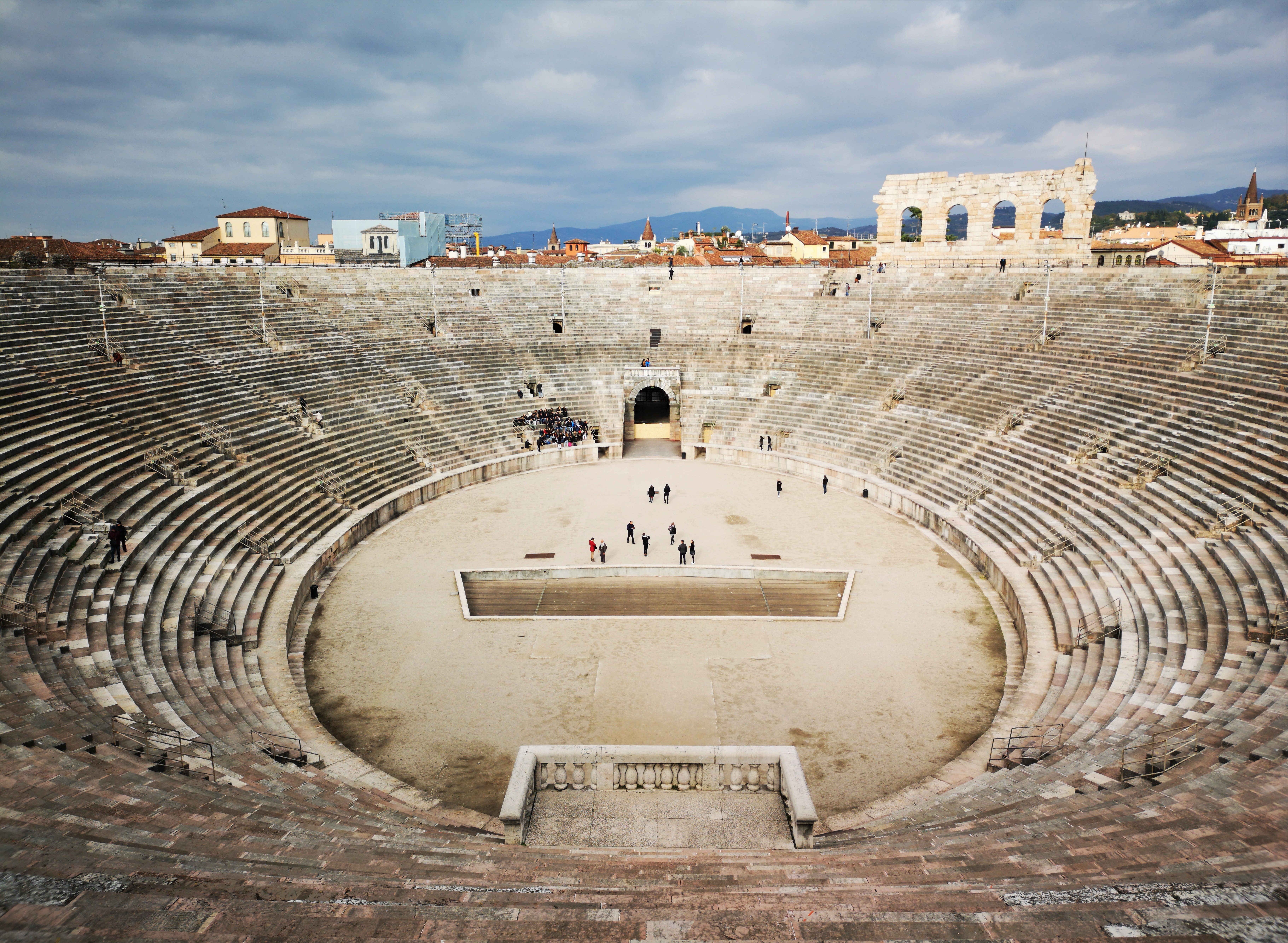 Arena di Verona This is a photo of a monument which is part of cultural heritage of Italy.